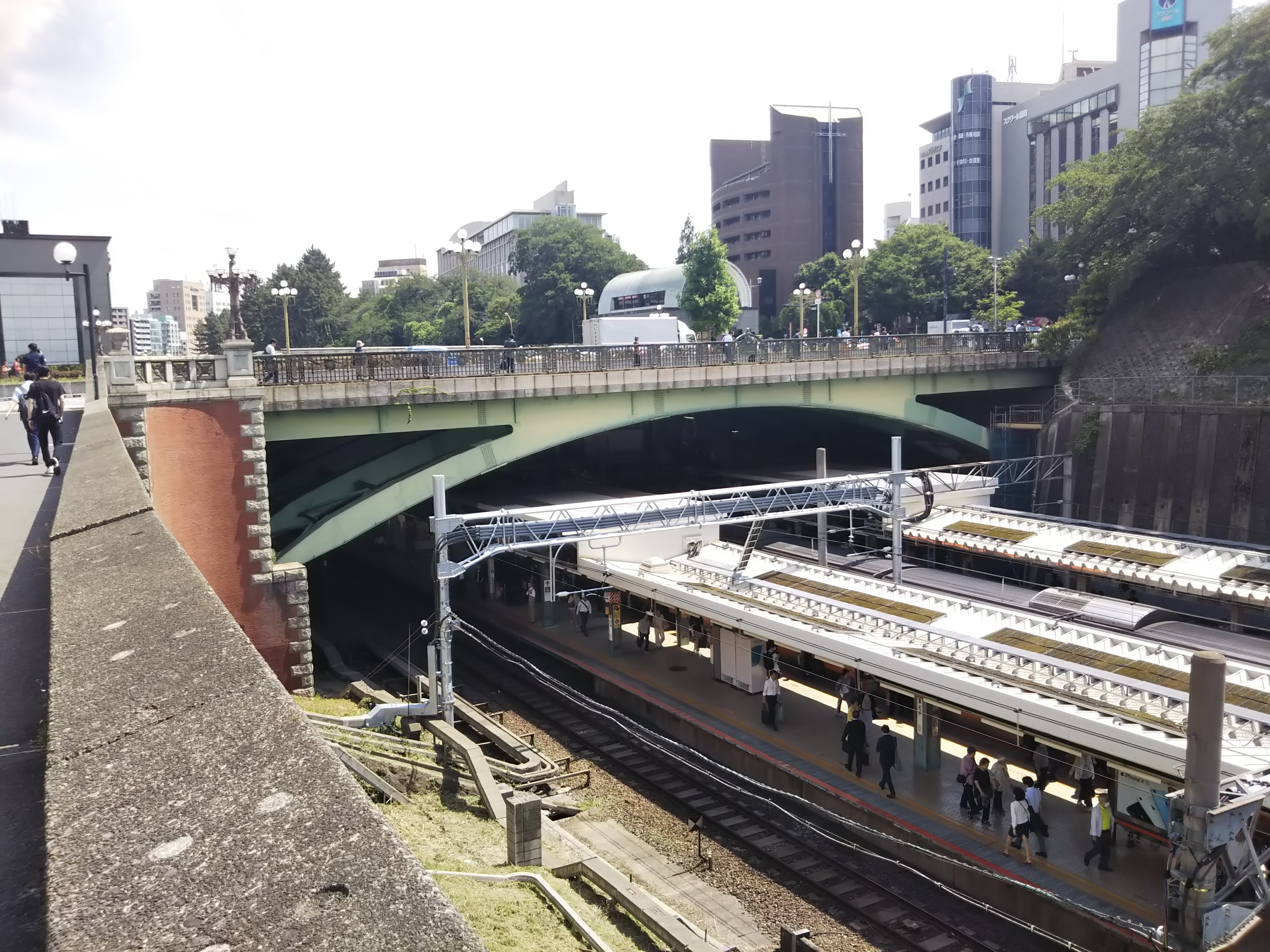 東京都新宿区、新宿通りの四谷見附橋。橋の下はJR中央線四ツ谷駅